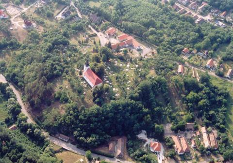 Telkibánya, Hungary, aerialphotography